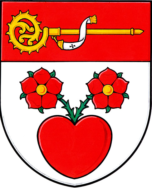 Znak obce Světlá